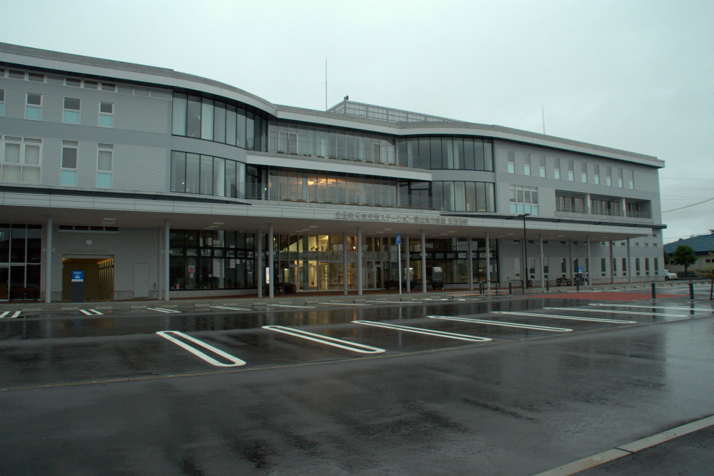 五百石駅です